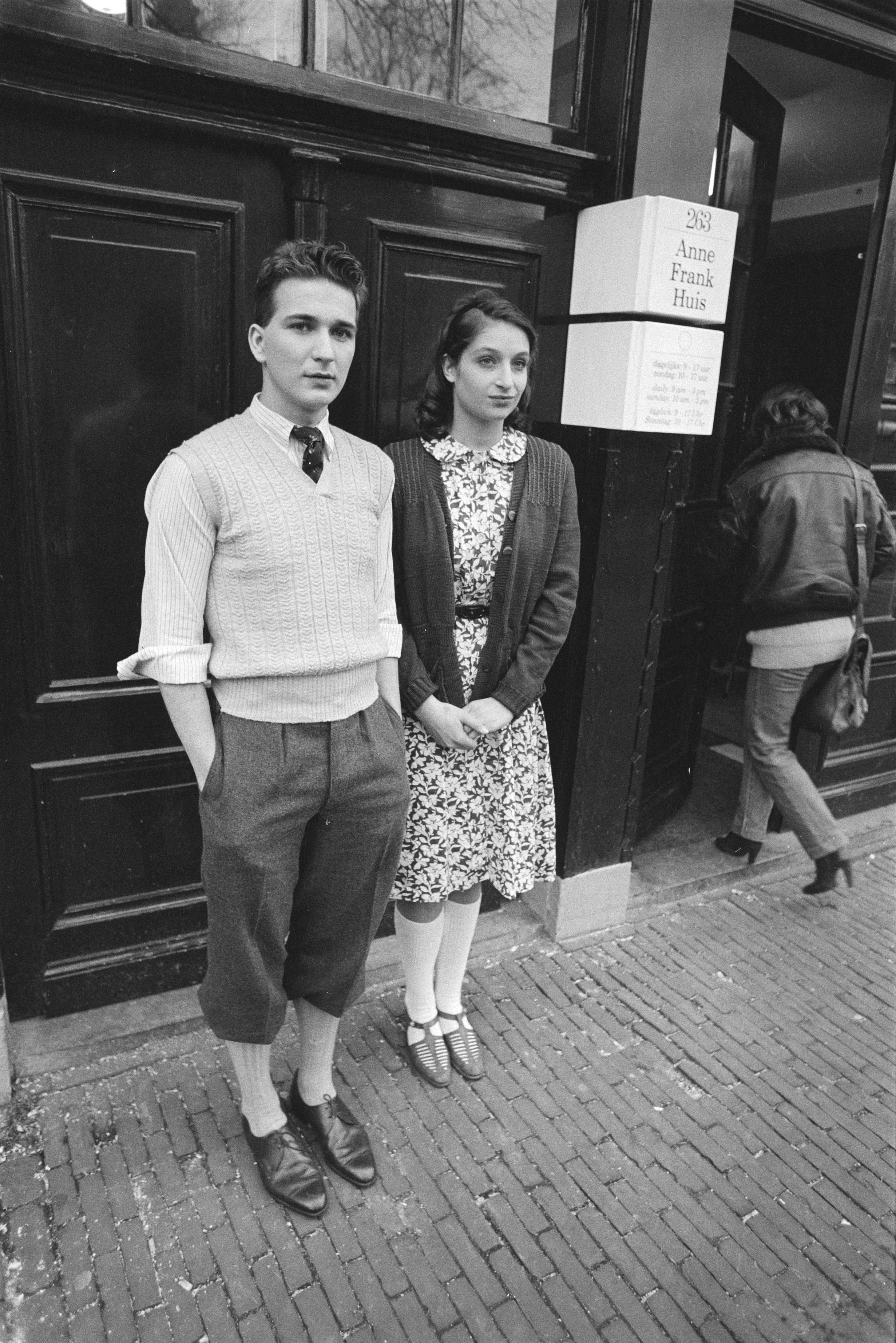 Collectie / Archief : Fotocollectie Anefo Reportage / Serie : [ onbekend ] Beschrijving : Presentatie toneelproduktie van "Dagboek van Anne Frank" Frank Rigter (Peter) en Jip Wijngaarden (Anne Frank) voor het Anne Frankhuis Datum : 12 december 1983 Locatie : Amsterdam, Noord-Holland Trefwoorden : acteurs, actrices, toneelspelers Persoonsnaam : Frank, Anne, Rigter, Frank, Wijngaarden, Jip Fotograaf : Bogaerts, Rob / Anefo Auteursrechthebbende : Nationaal Archief Materiaalsoort : Negatief (zwart/wit) Nummer archiefinventaris : bekijk toegang 2.24.01.05 Bestanddeelnummer : 932-8060